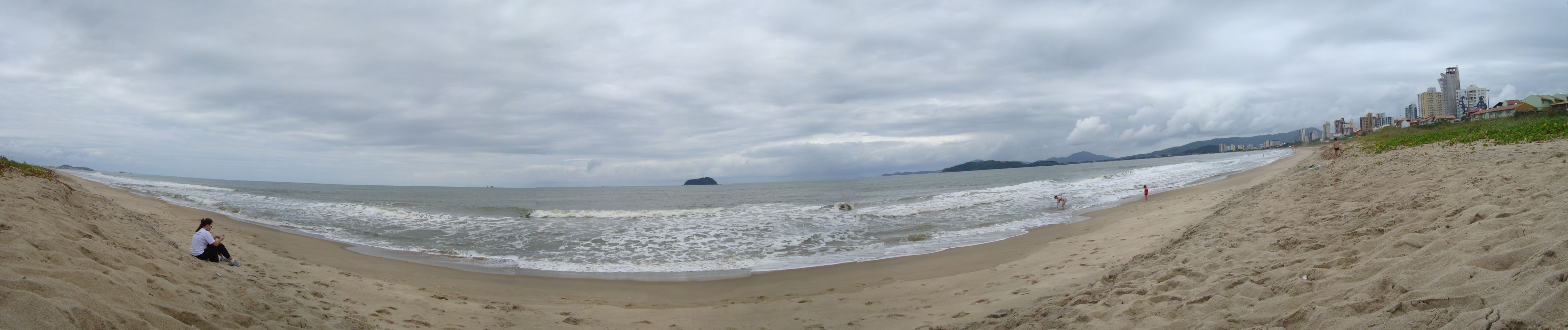 Panorama de uma praia de Balneário Piçarras, em Santa Catarina, região Sul brasileira.